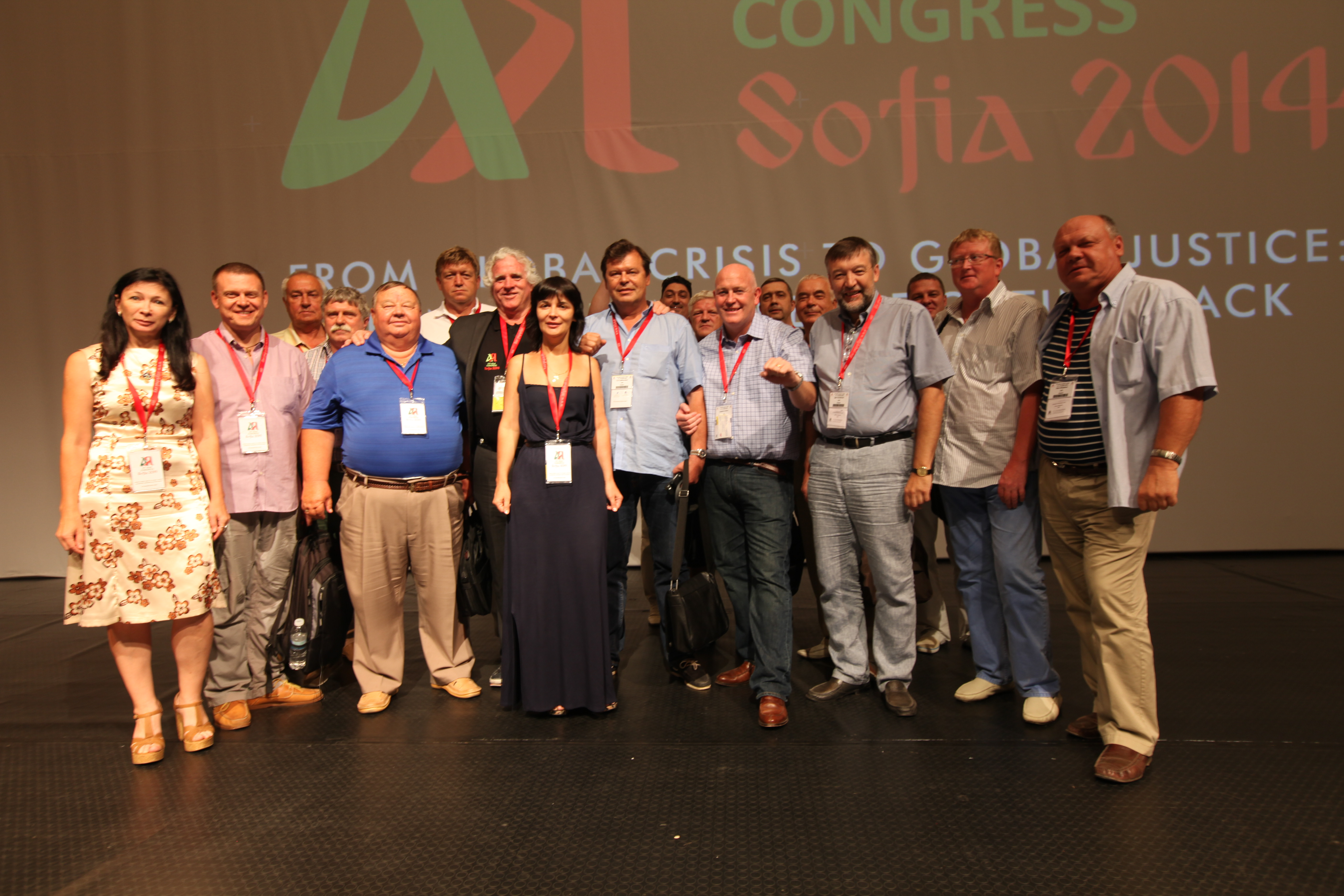 Делегация РПСМ на 43-м Конгрессе МФТ в Болгарии, София, 2014 г.